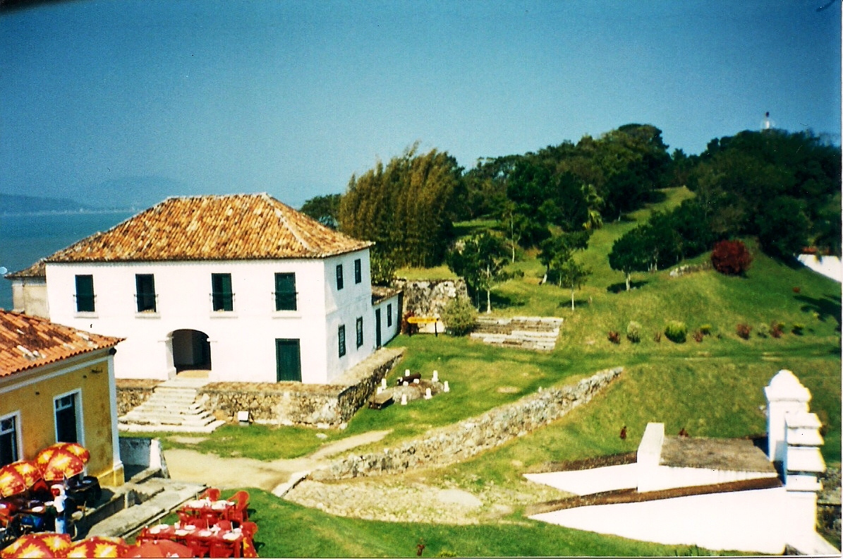 Fortaleza de Santa Cruz de Anhatomirim, ilha de Anhatomirim, SC, Brasil: vista do interior com destaque para o Quartel do Comandante.